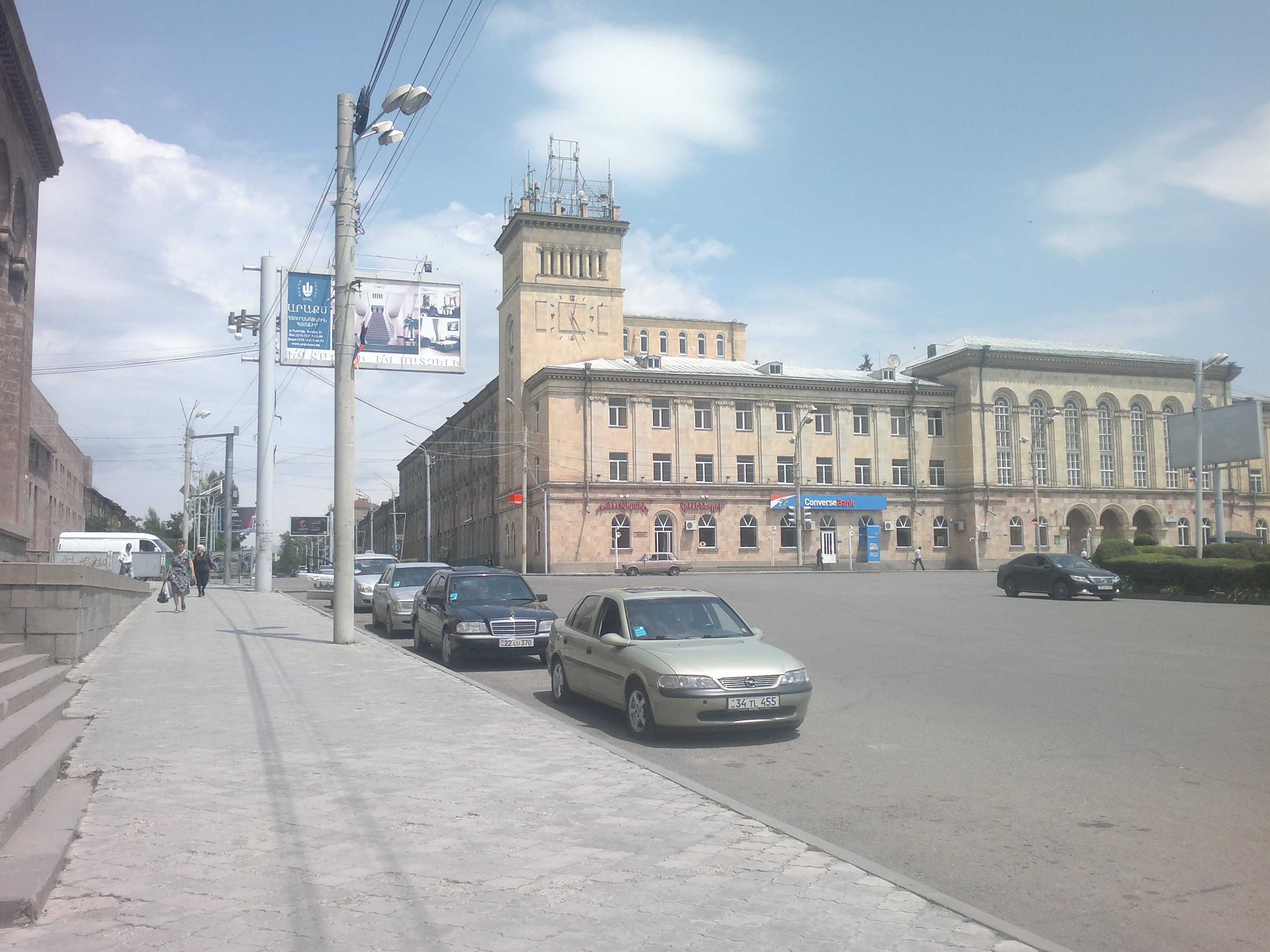 Գյումրու Գուլպա-նասկեղենի գործարան